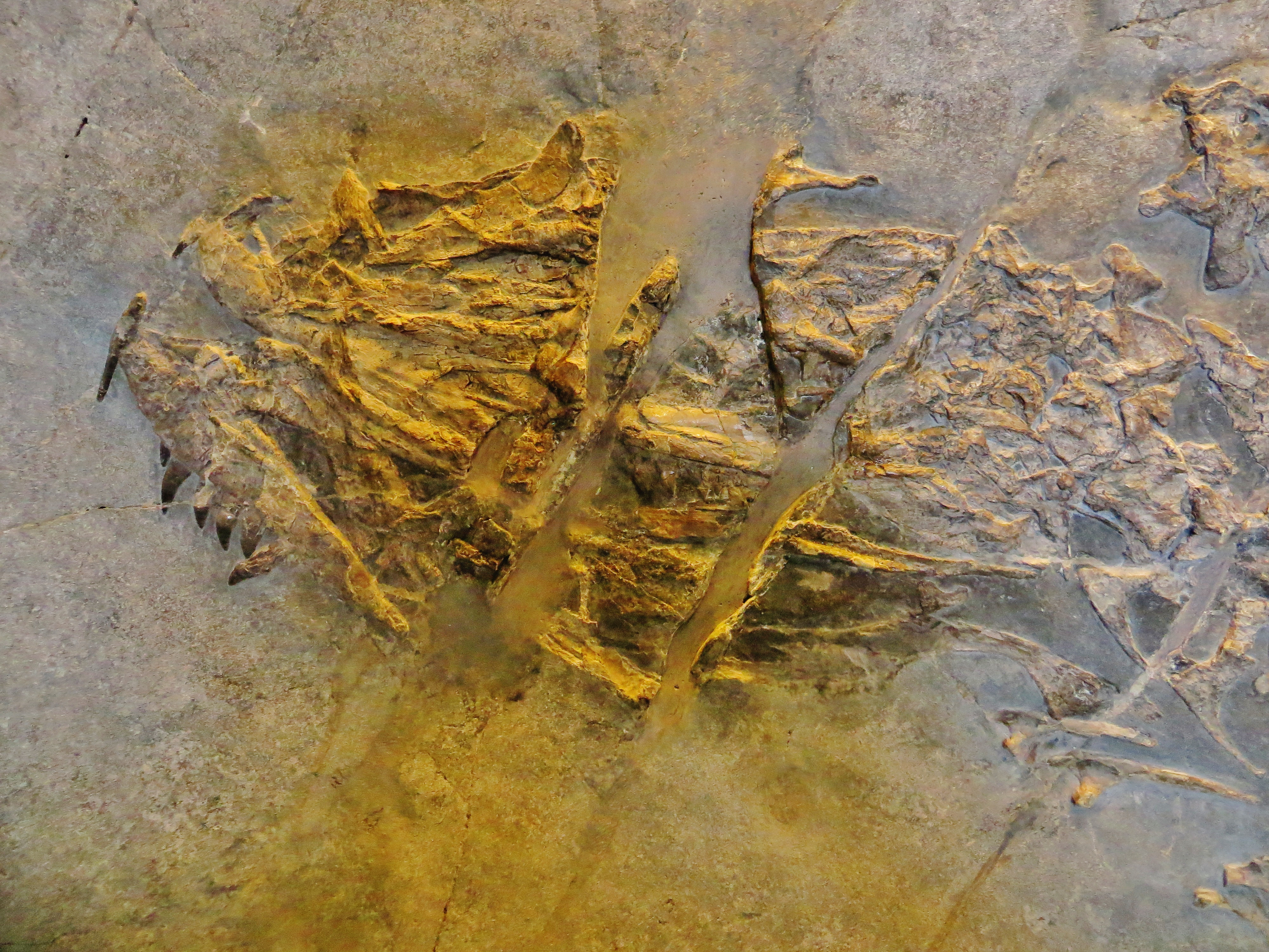 Fossil - Took the picture at Museum of Natural History Zurich